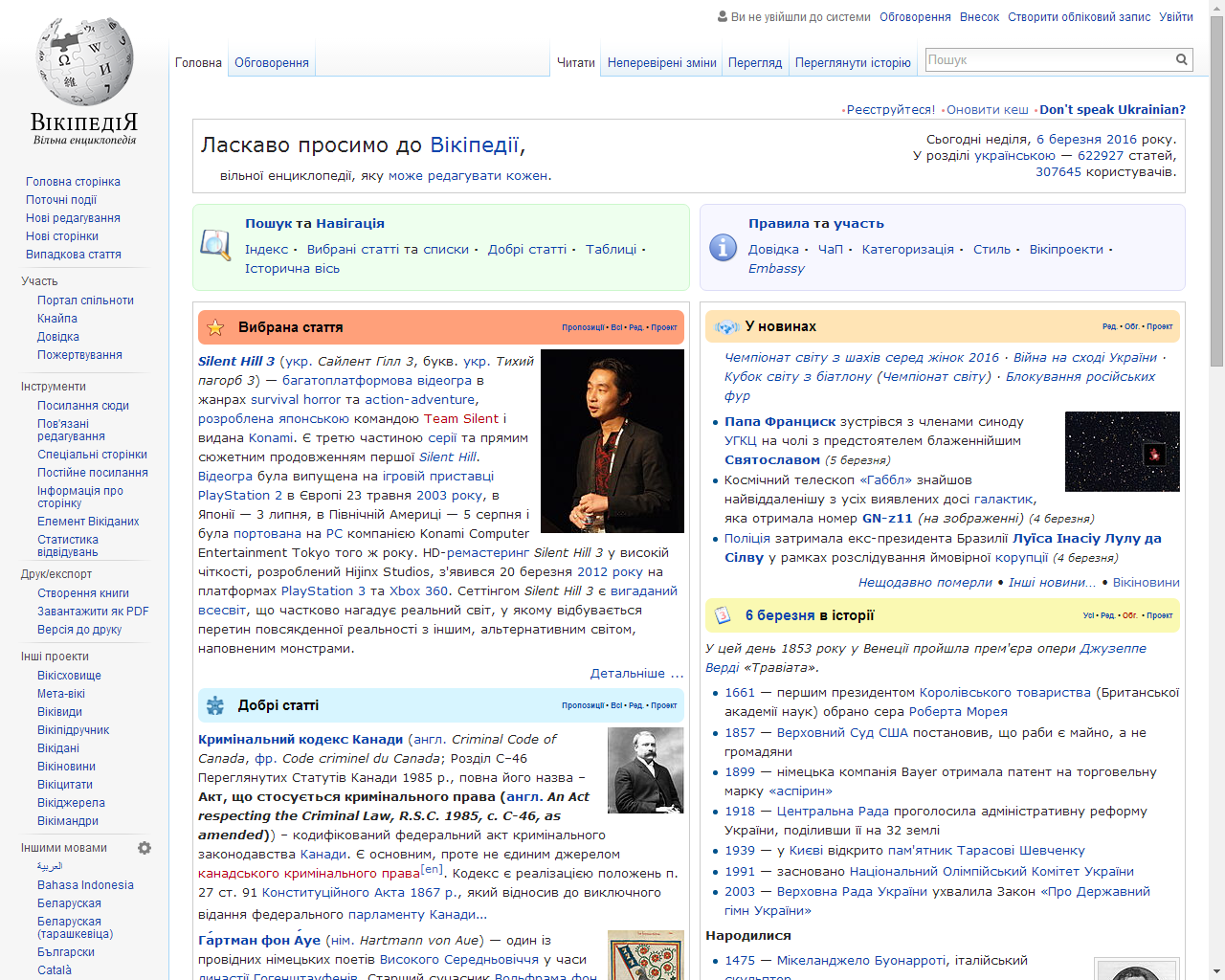 Головна сторінка української Вікіпедії - 6 березня 2016.